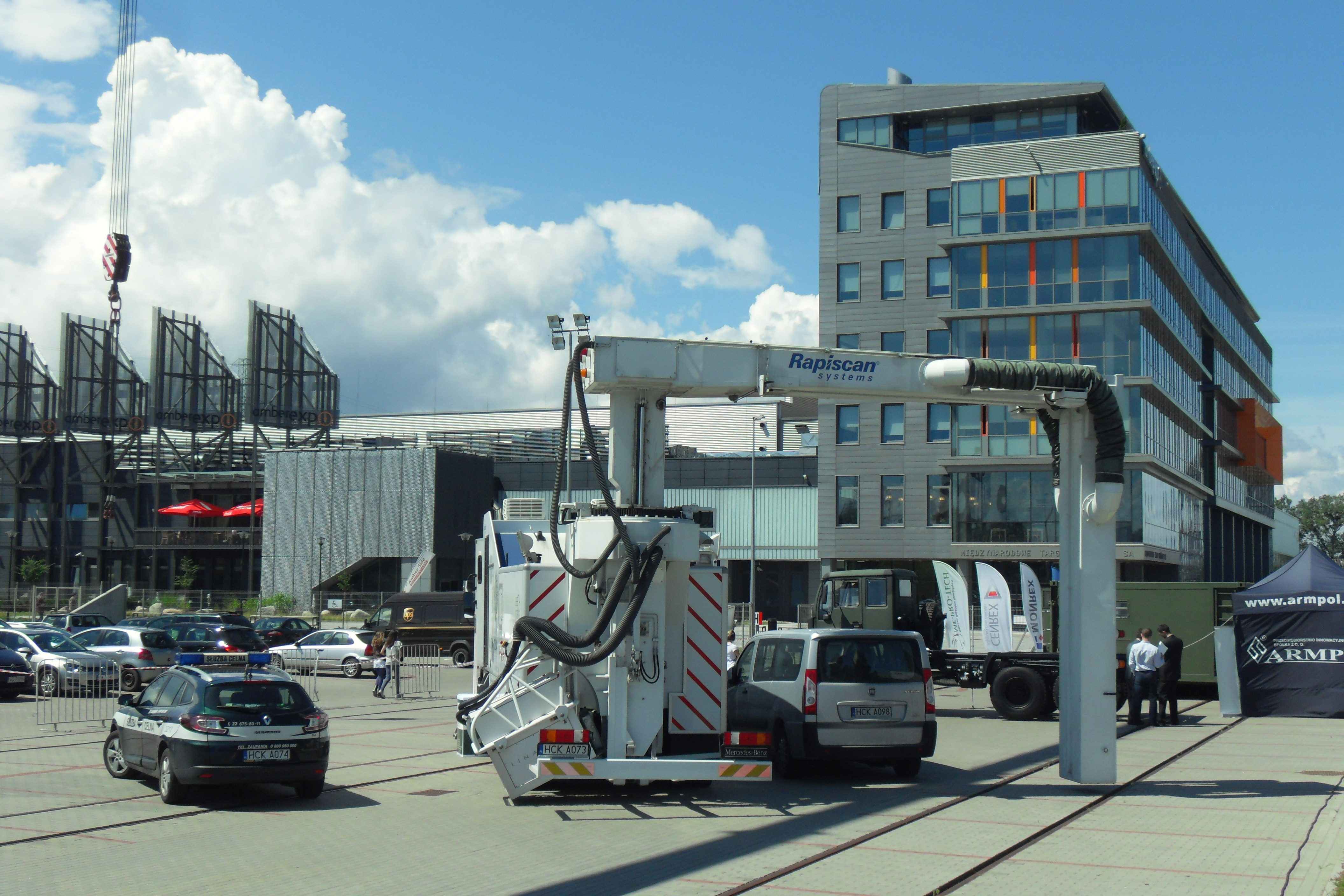 Centrum Wystawienniczo-Kongresowe AMBEREXPO. Gdańsk Letnica, ul. Żaglowa 11. Targi "Balt-Military-Expo" 2014.